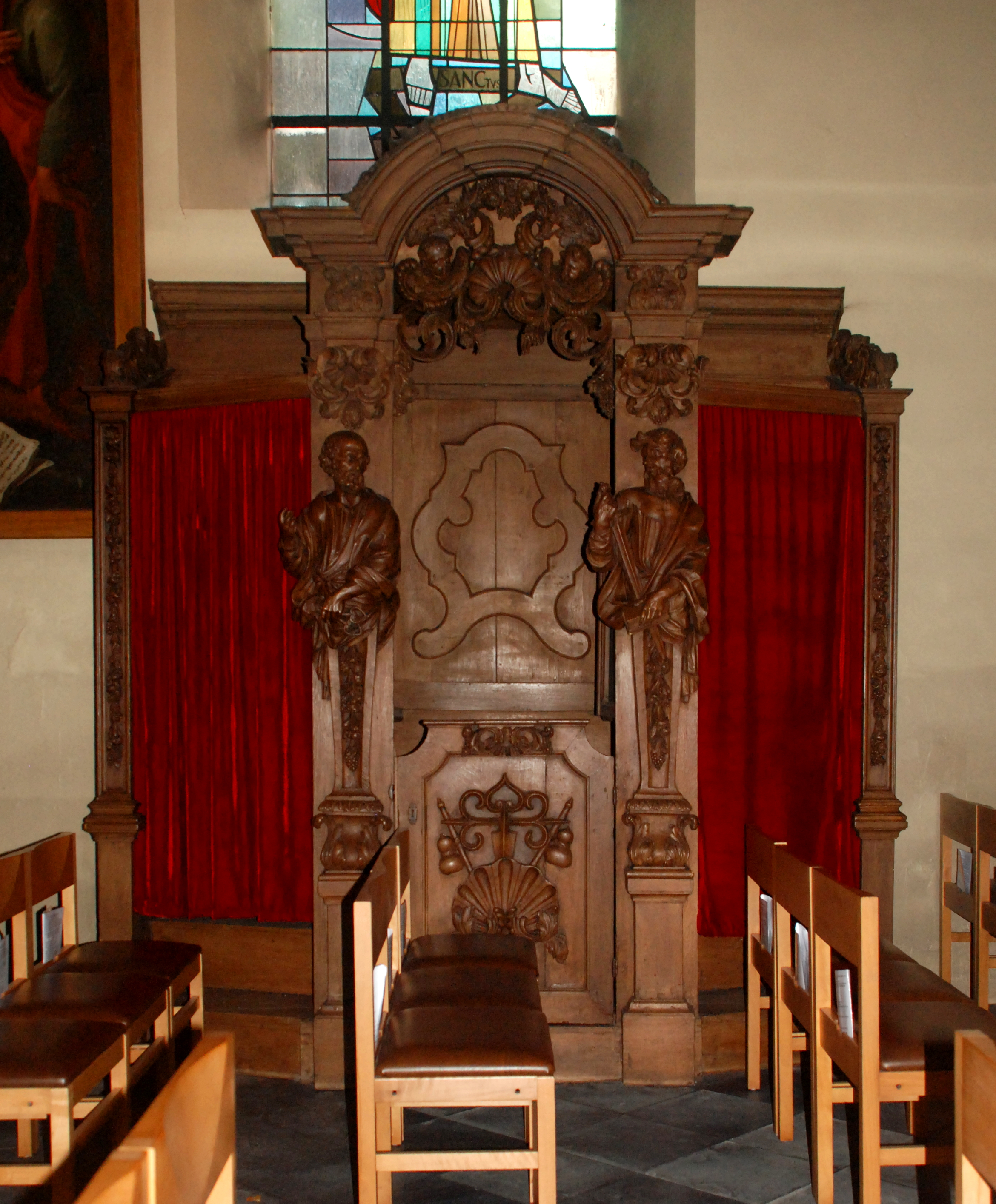 Belgique - Brabant wallon - Ottignies - Église Saint-Rémi